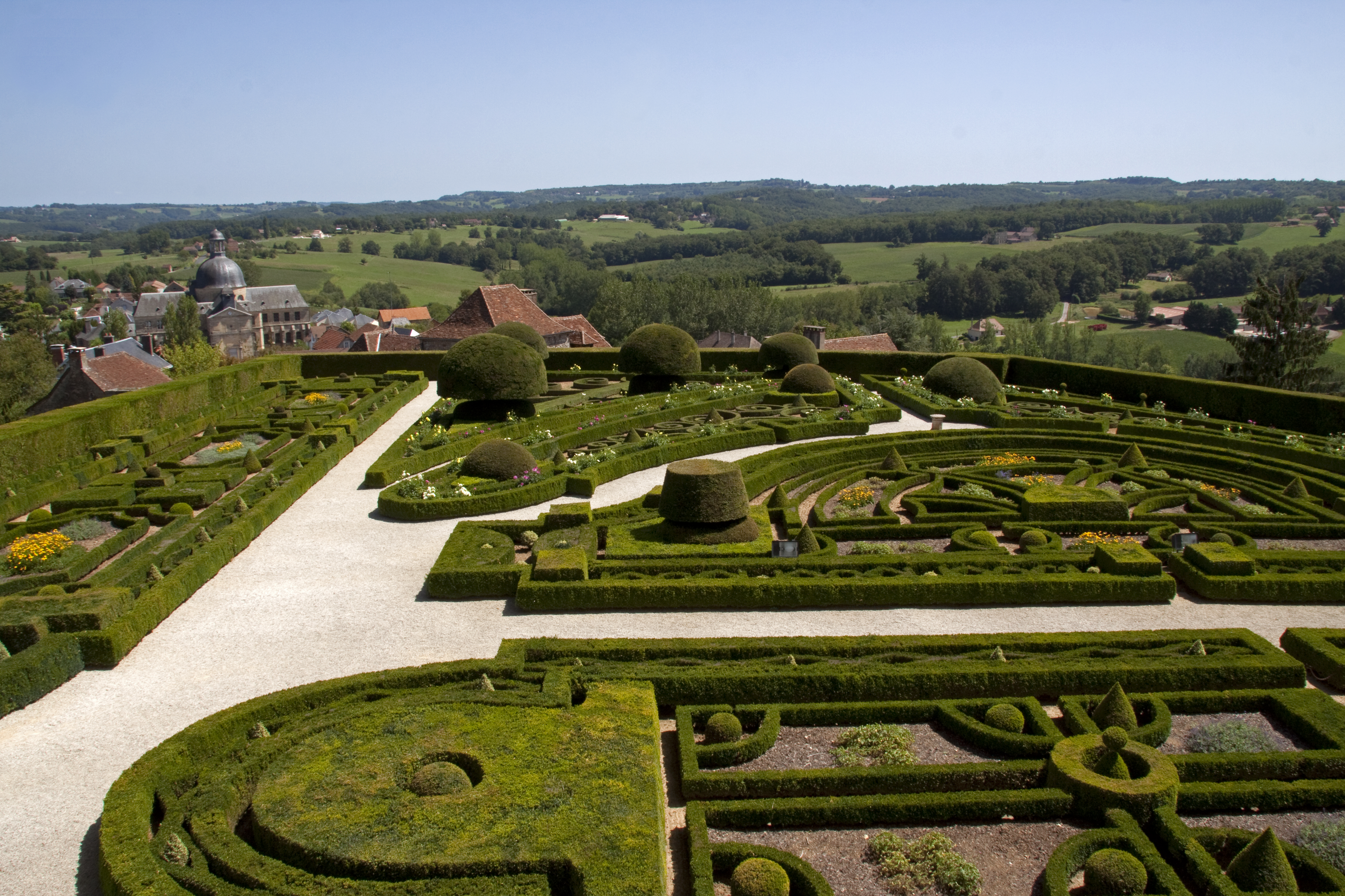 Barockgarten des Schlosses Hautefort